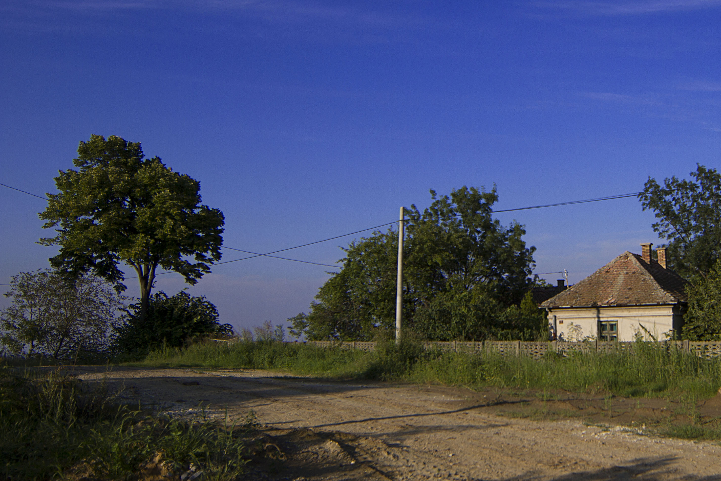 Пударци